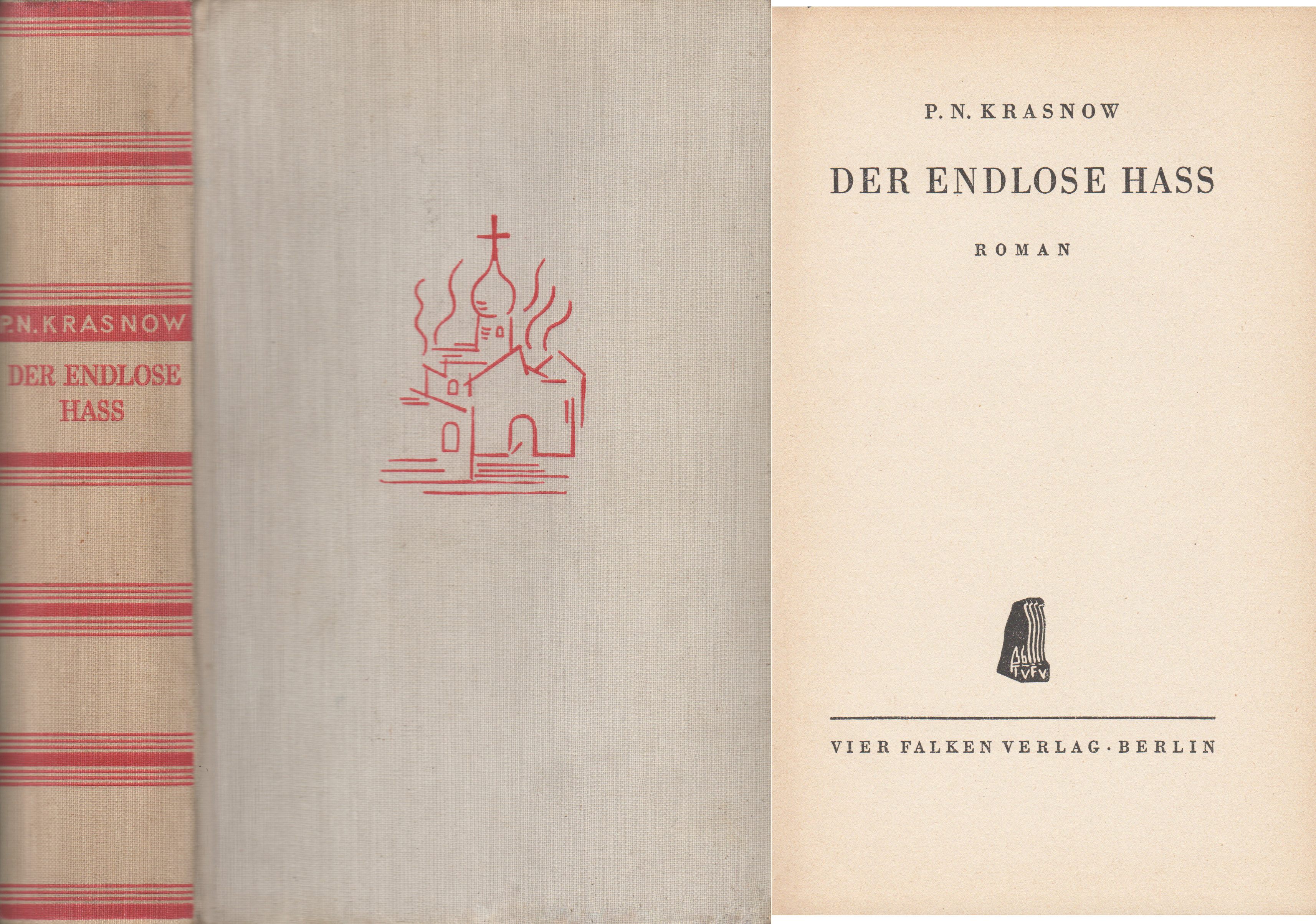 Der endlose Hass ist ein Roman von dem ehemaligen zaristischen General P. N. Krasnow, den er in seiner Emigration schrieb, übersetzt von Dr. Bernhard Schulze Berlin, Vier Falken Verlag Berlin Erstausgabe 1938, das Buch enthält 624 Seiten.